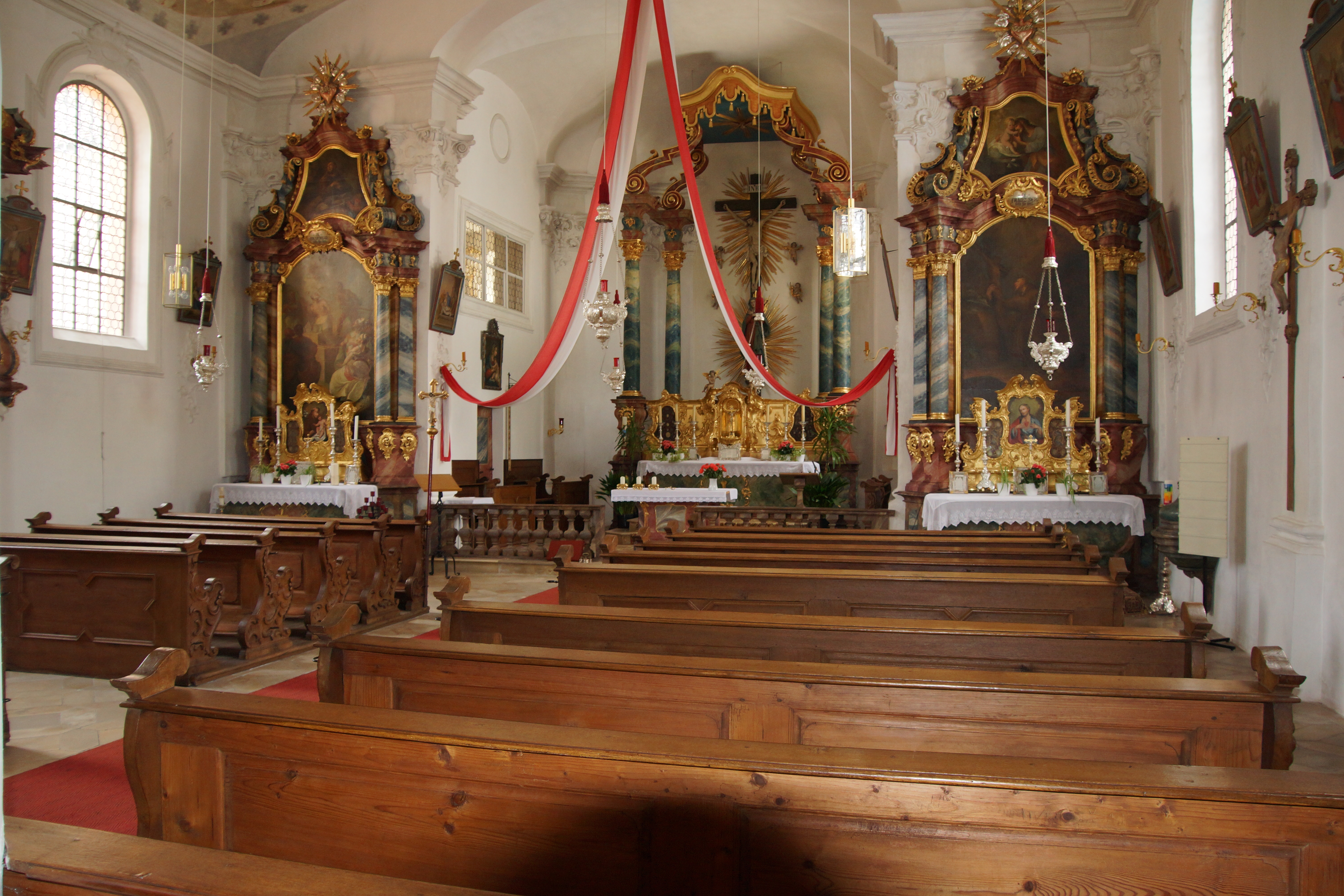 Die katholische Pfarrkirche Maria sieben Schmerzen / Mater Dolorosa in und auf dem Sulzbürg, Kreis Neumarkt Oberpfalz